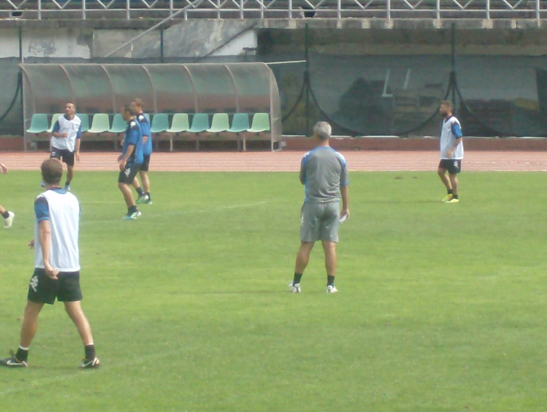 All. Atzori